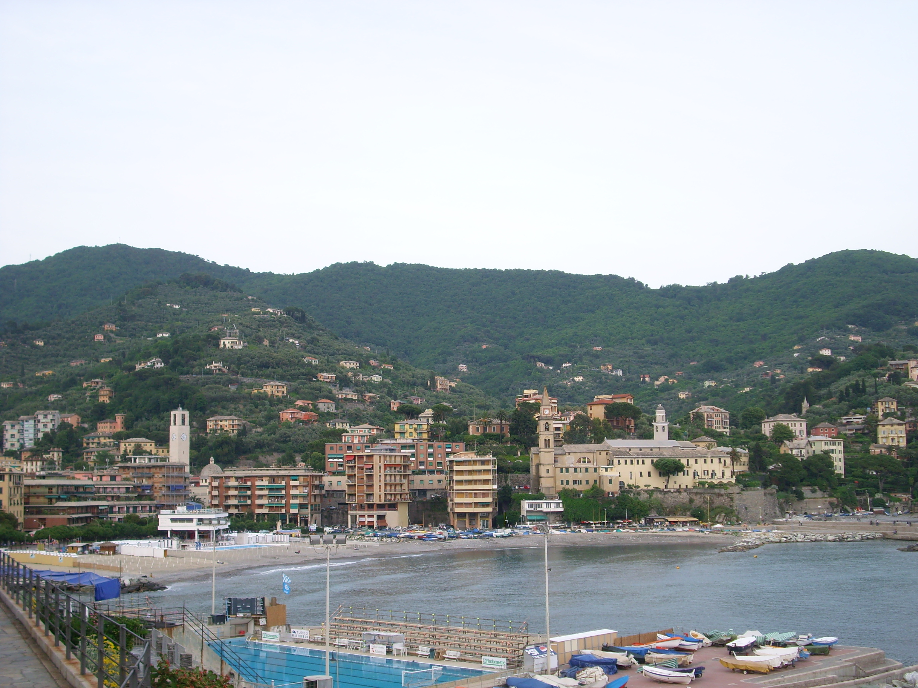 La spiaggia e il porticciolo di Recco